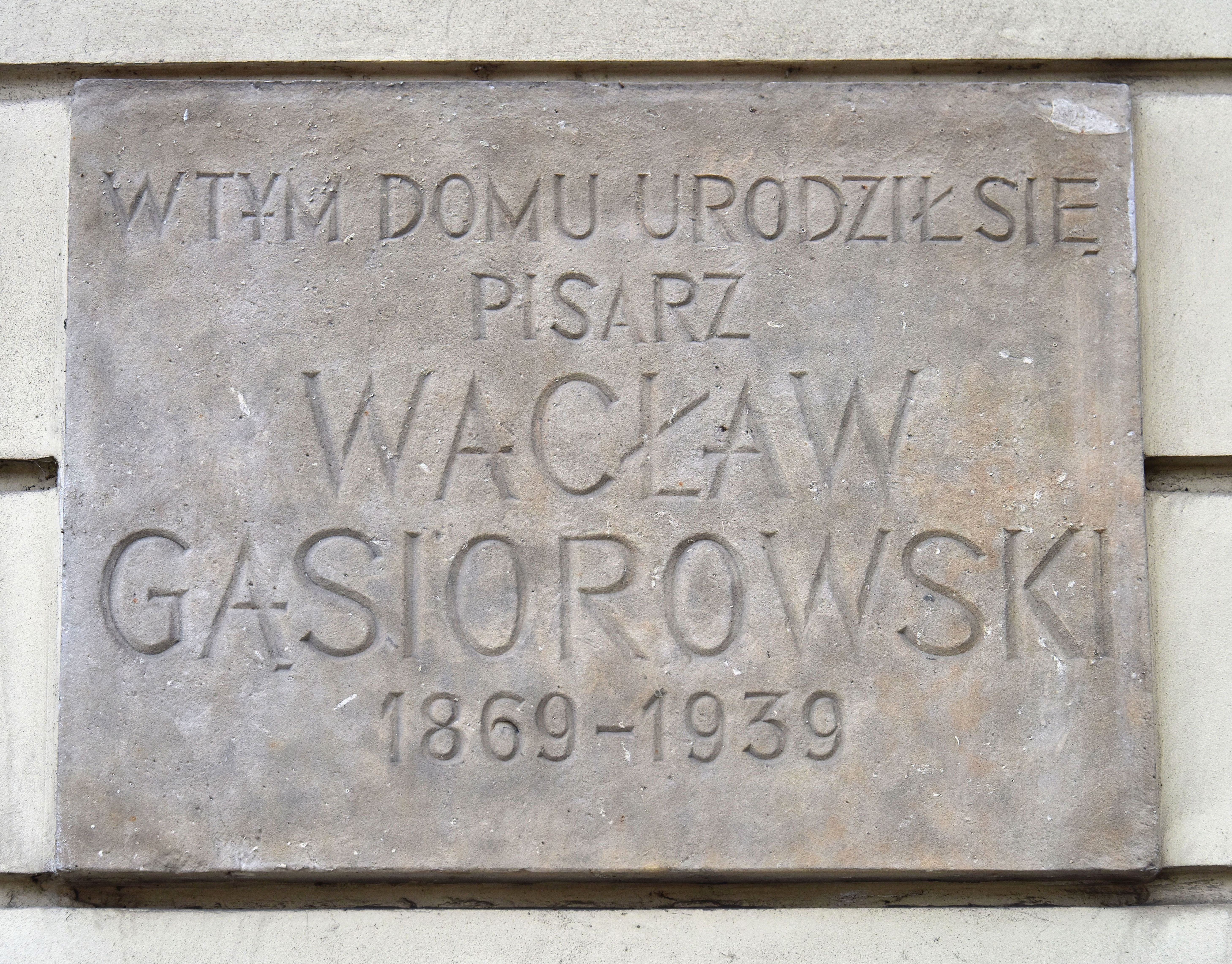 Tablica upamiętniająca Wacława Gąsiorowskiego na bocznej ścianie pałacu Biskupów Krakowskich przy ul. Miodowej 5 w Warszawie